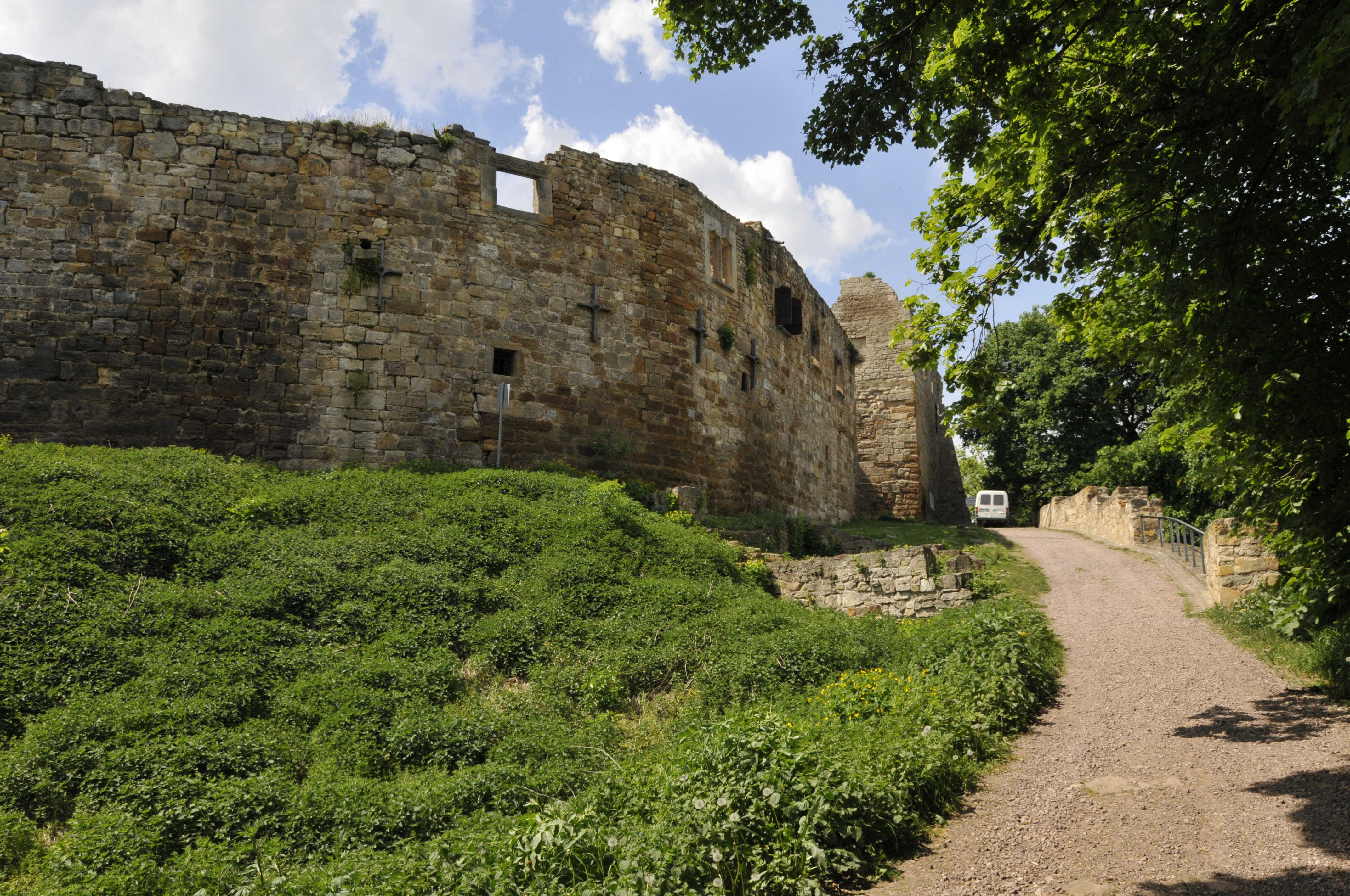 Burg Gleichen, Eingangsbereich